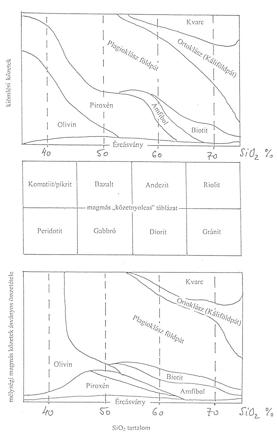 A vulkáni és a plutoni kőzetek ásványos összetétele